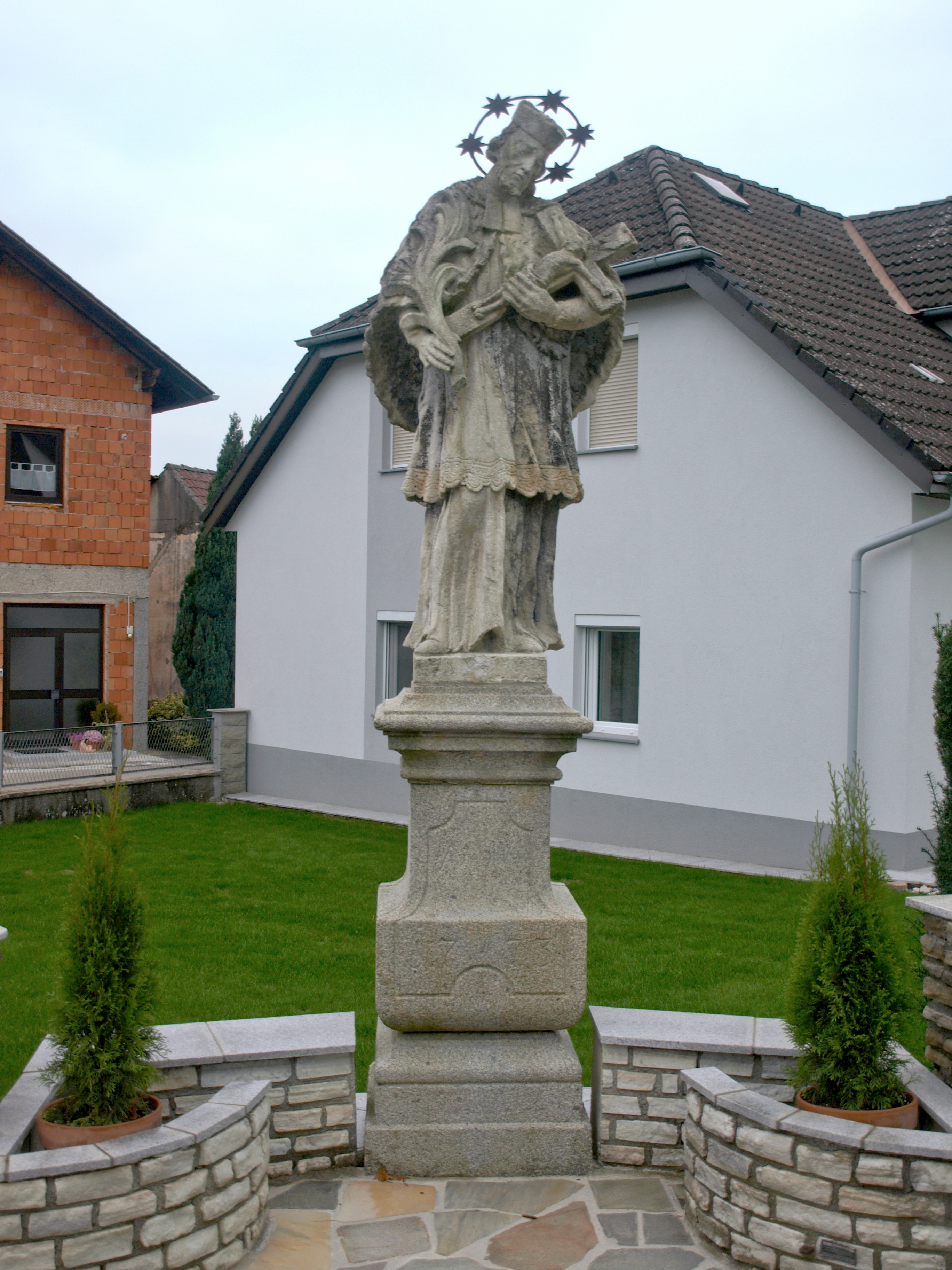 Johannes Nepomuk Statue in Erla - St. Pantaleon-Erla